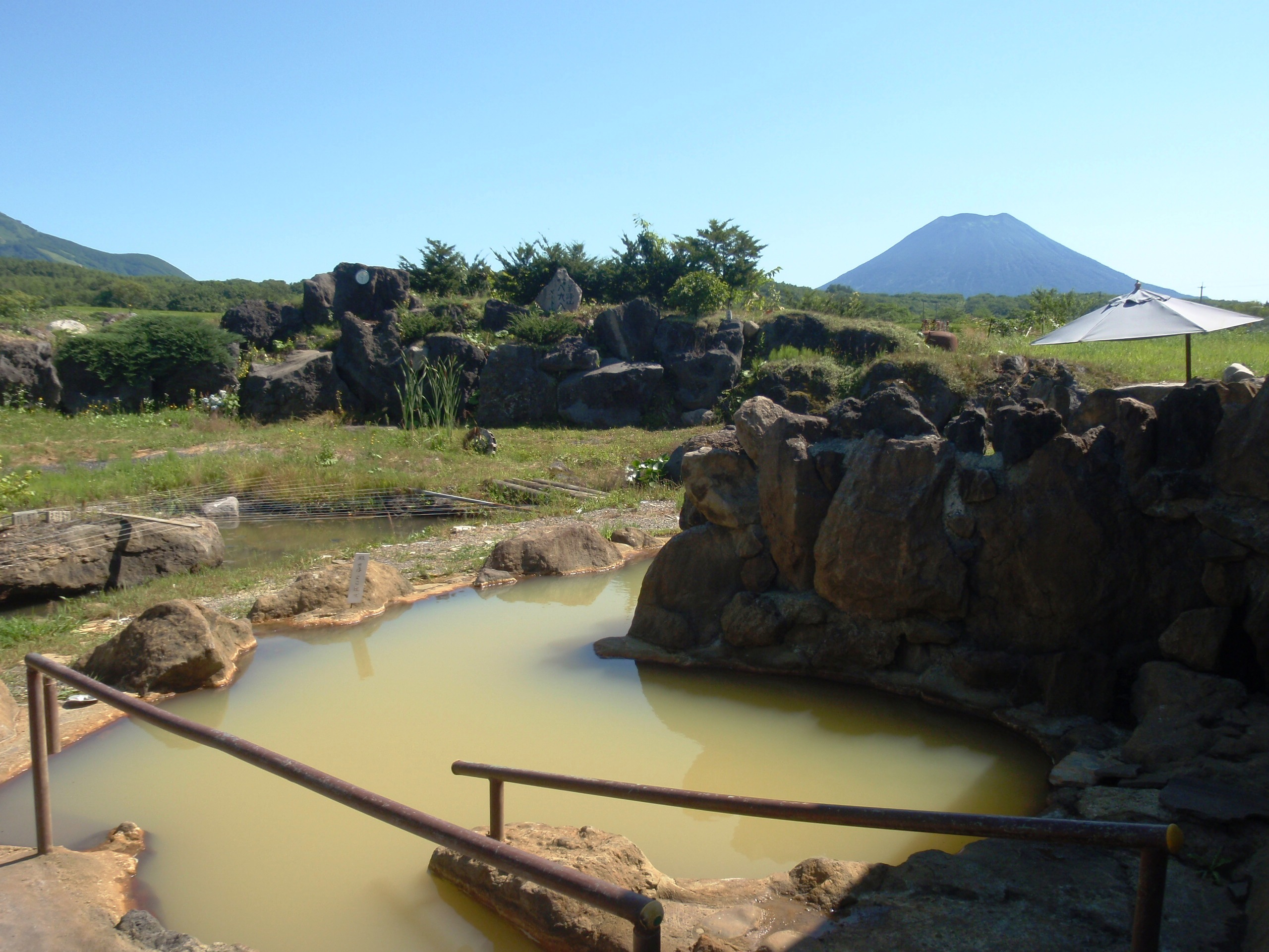 ニセコ黄金温泉露天風呂